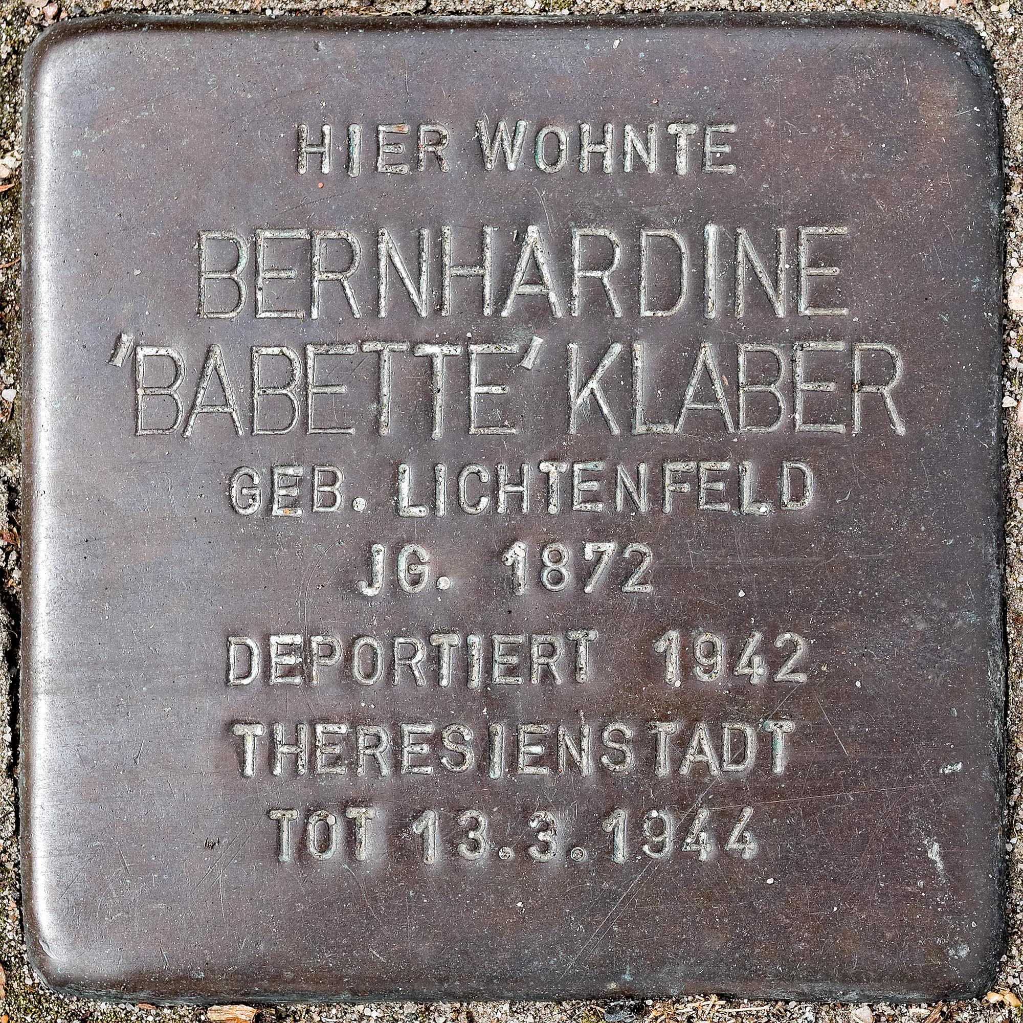 Stolperstein Klaber, Bernhardine